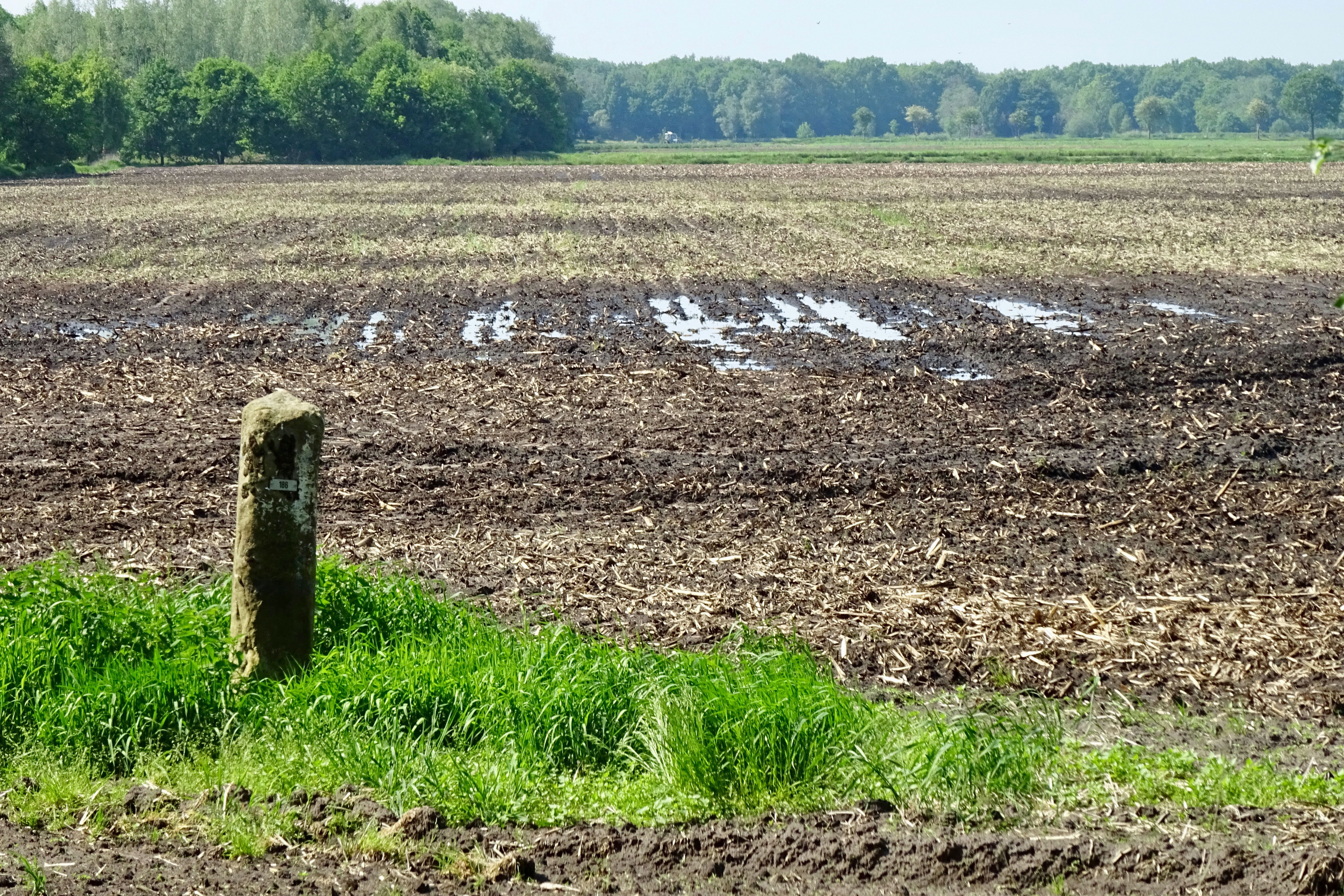 Grenspaal nabij de Lethe en de Brualer Schloot